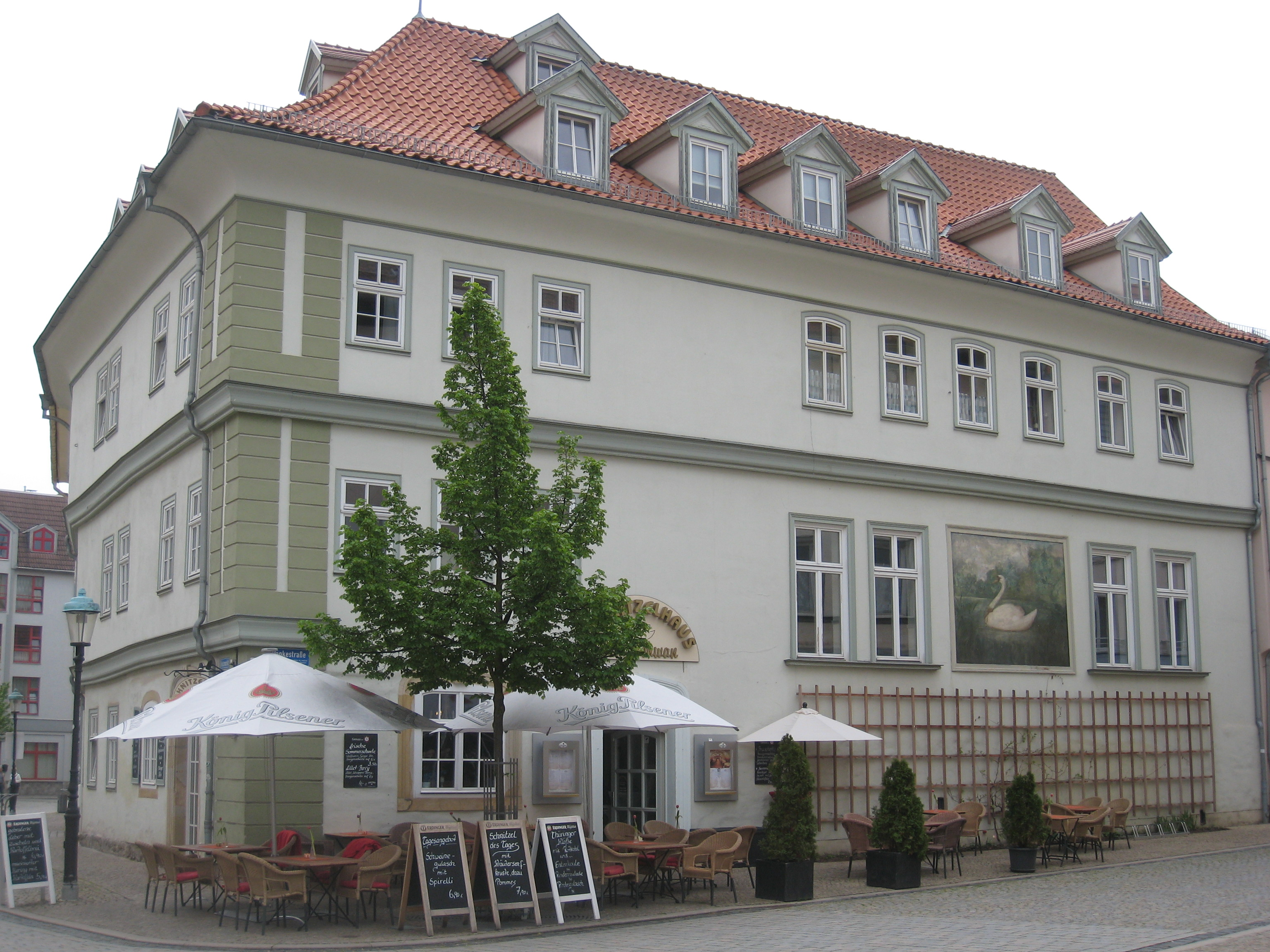 Historisches Gasthaus "Zum Schwan" in Arnstadt (Rankestraße 2).